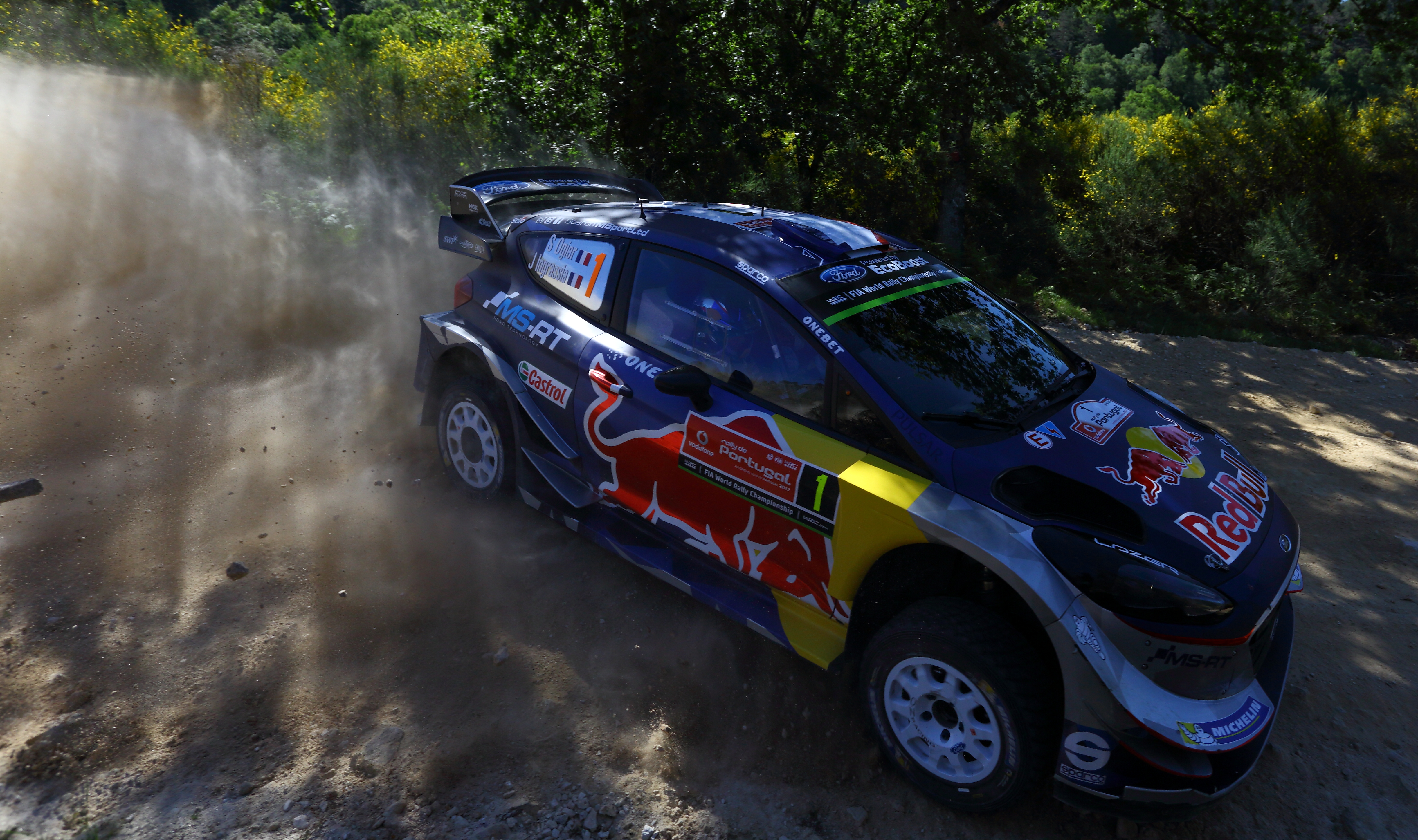 2017 Rally de Portugal